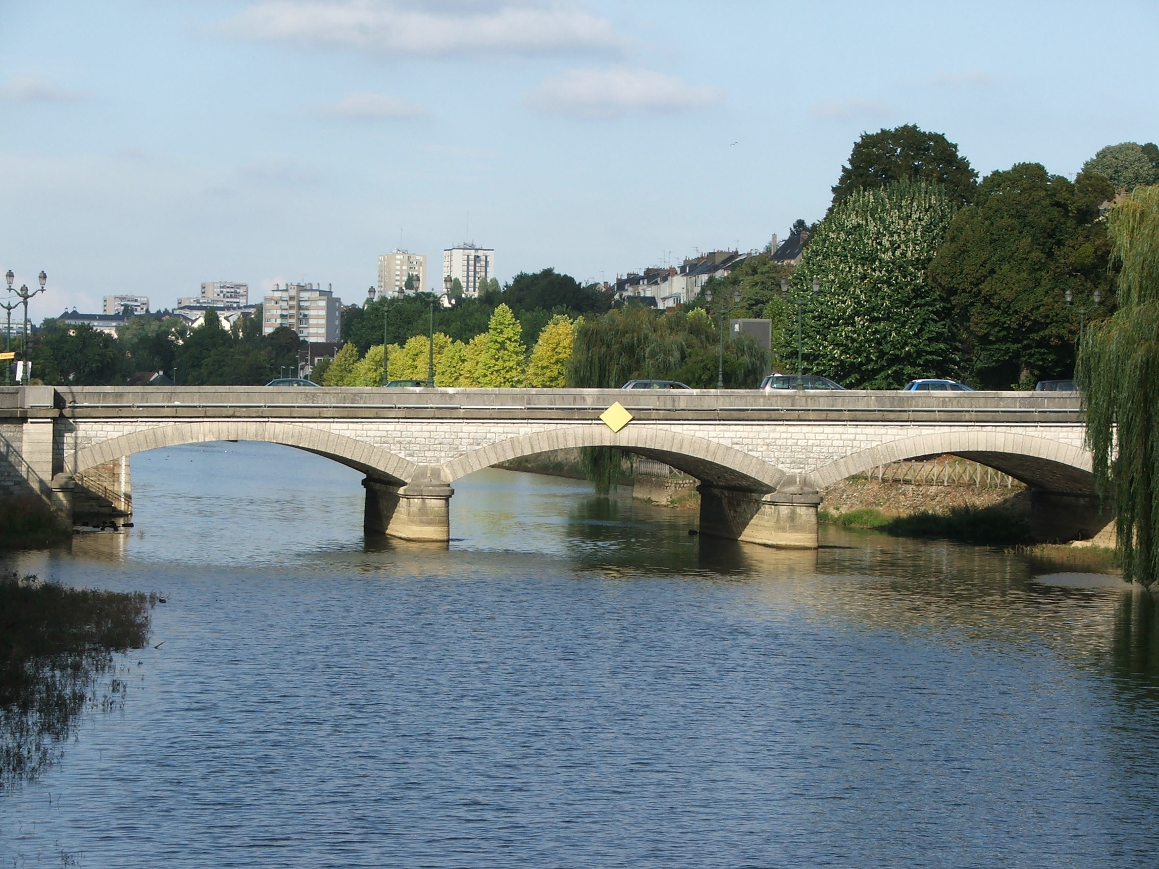 Le pont Issoir au Mans